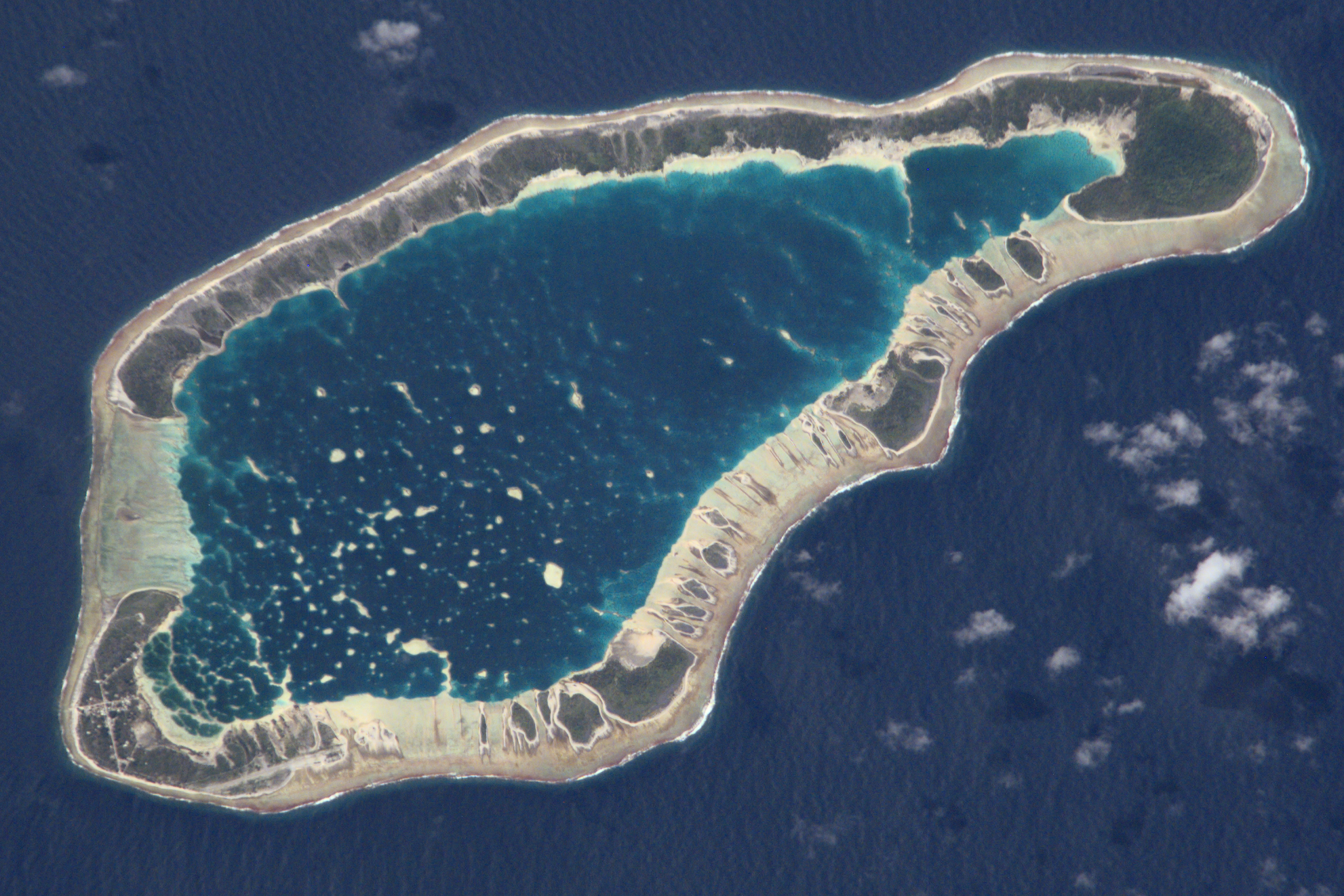 Eiland in de Tuamotu archipel, Frans Polynesie Oorspronkelijke naam: ESC_large_ISS002_ISS002-E-6371.TIF Bron: NASA